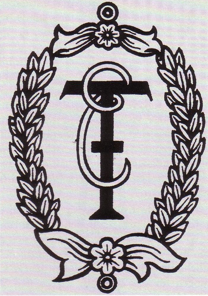 Symbol des Harmonistenordens (Jena)